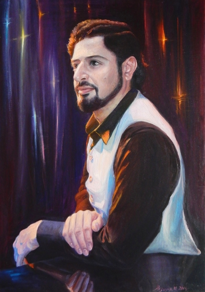 Михаил Альтшуллер контрабасист